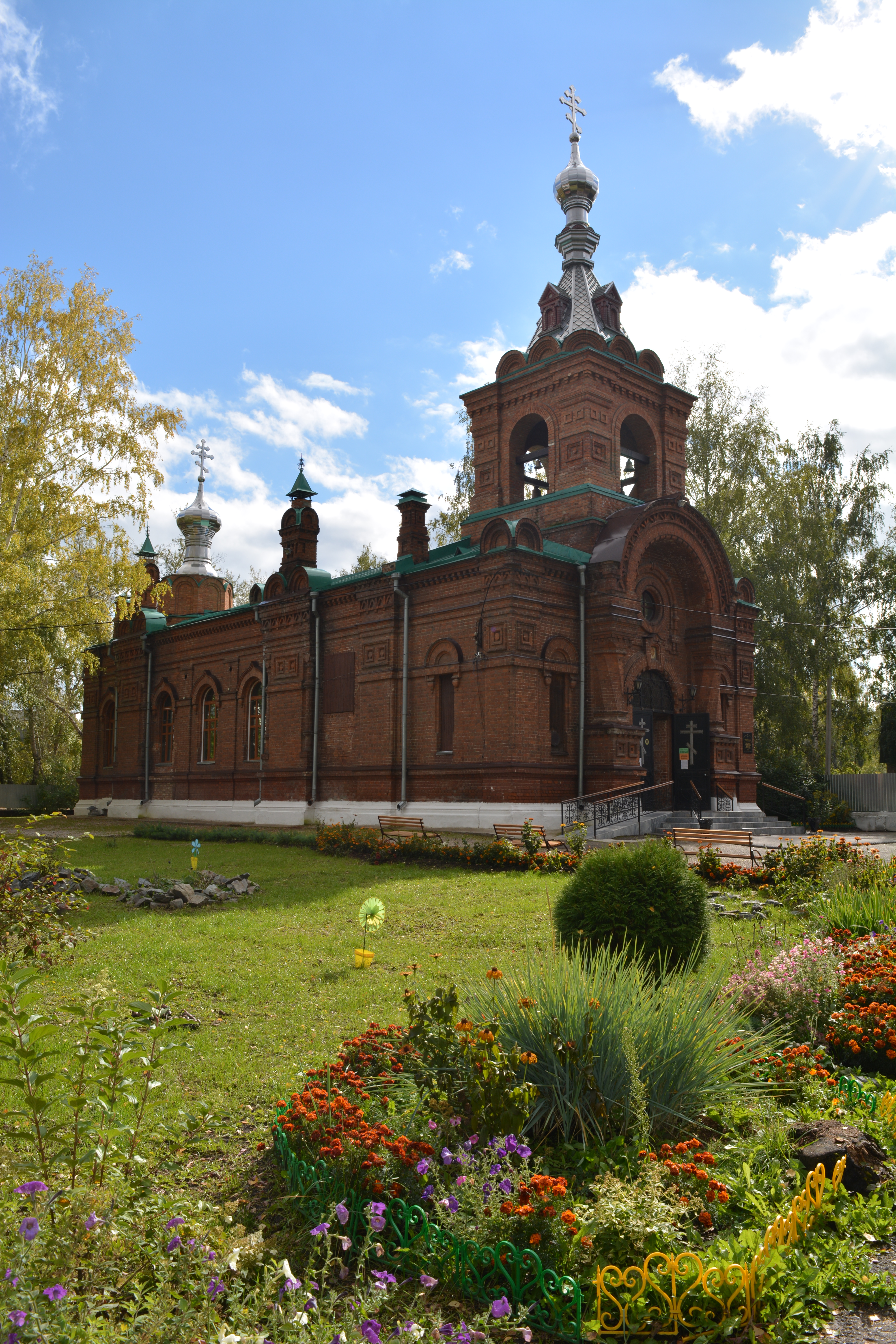 Церковь Первоапостолов Петра и Павла: Центральная улица, 12а, Томск, Томская область